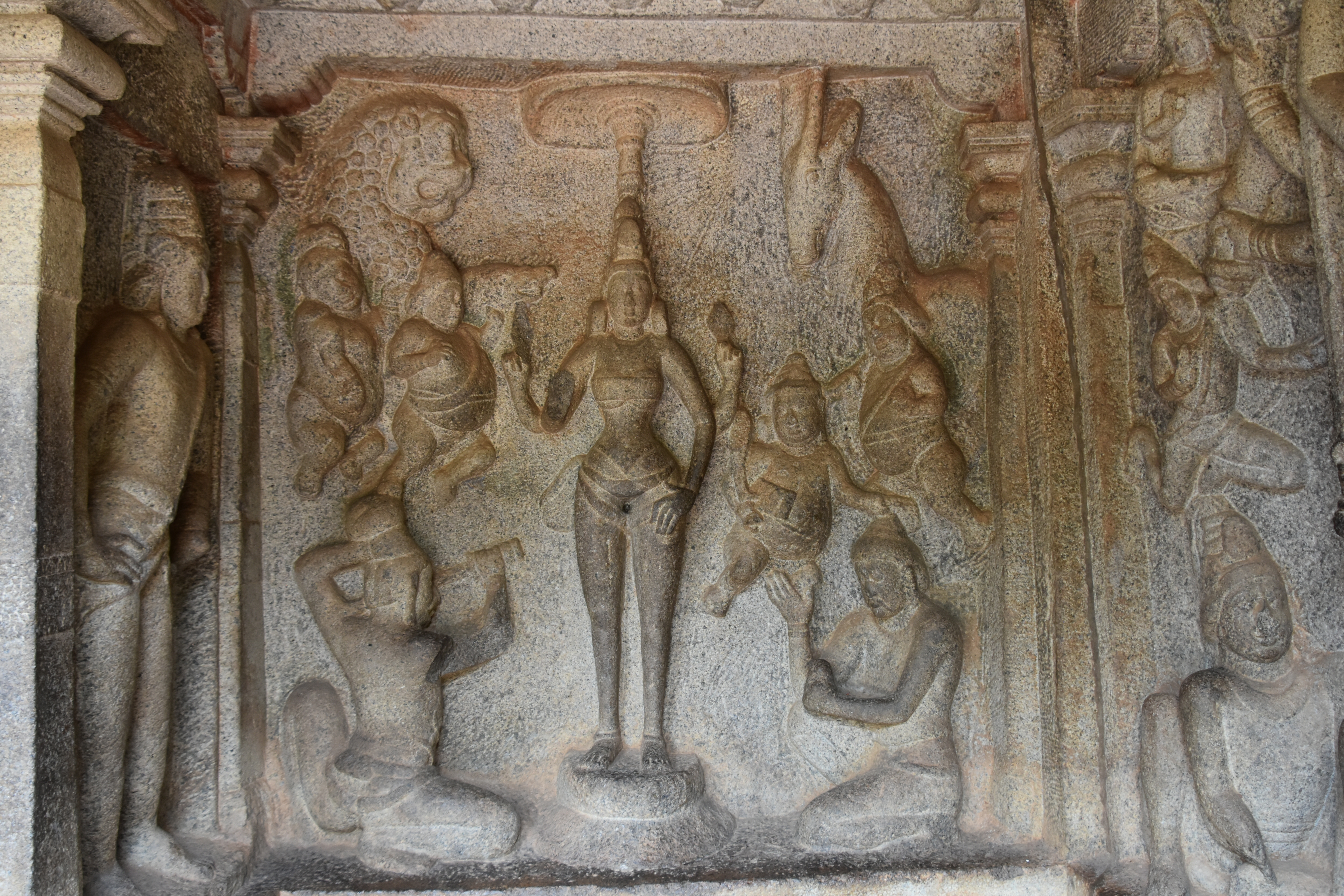 Varaha Cave Temple, Varaha mandapam mandapa Mahabalipuram, Mamallapuram, Tamil Nadu 2017